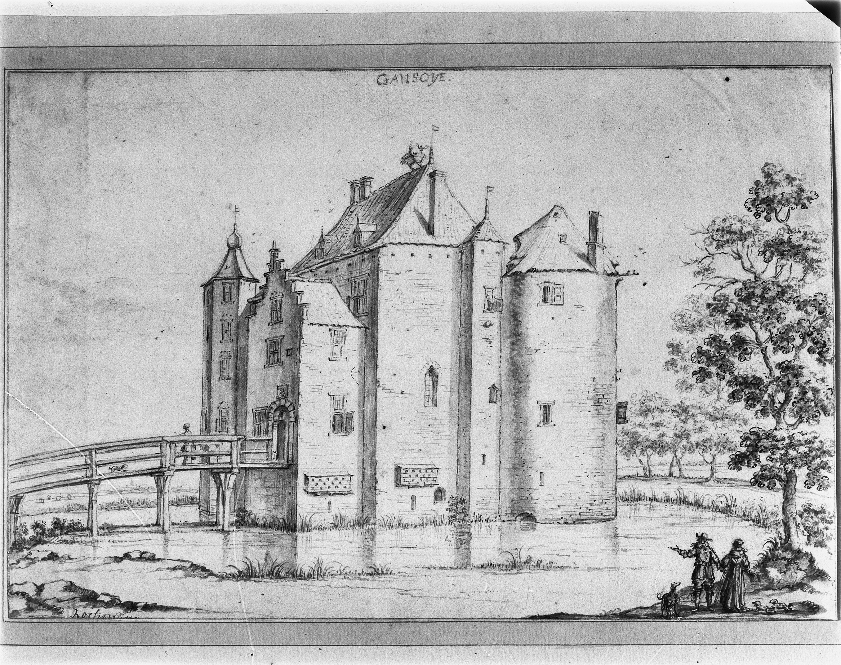 Huis Dorsen: (Meisry), reproductie door J.de Beijer, 1738. Mogelijk kasteel Gansoyen.